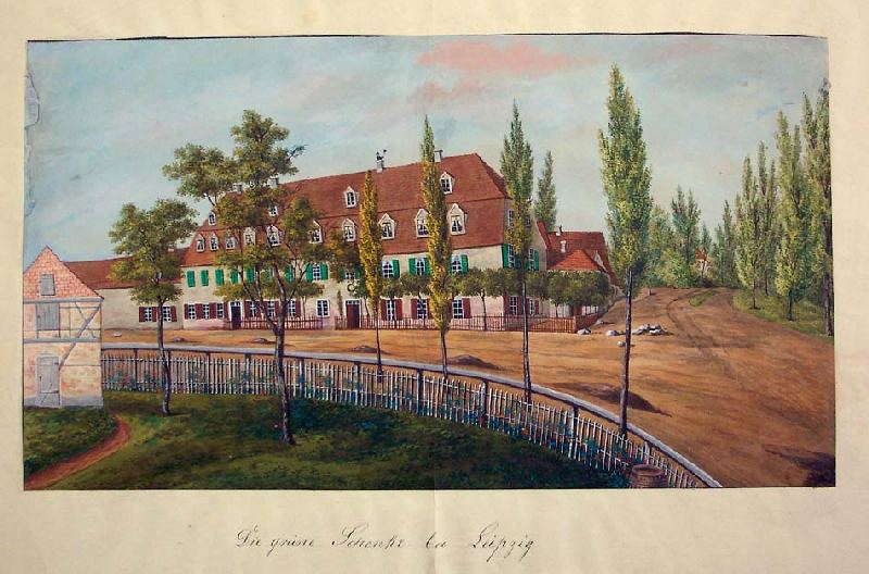 Die Grüne Schenke in Anger-Crottendorf bei Leipzig auf einem Aquarell von 1880